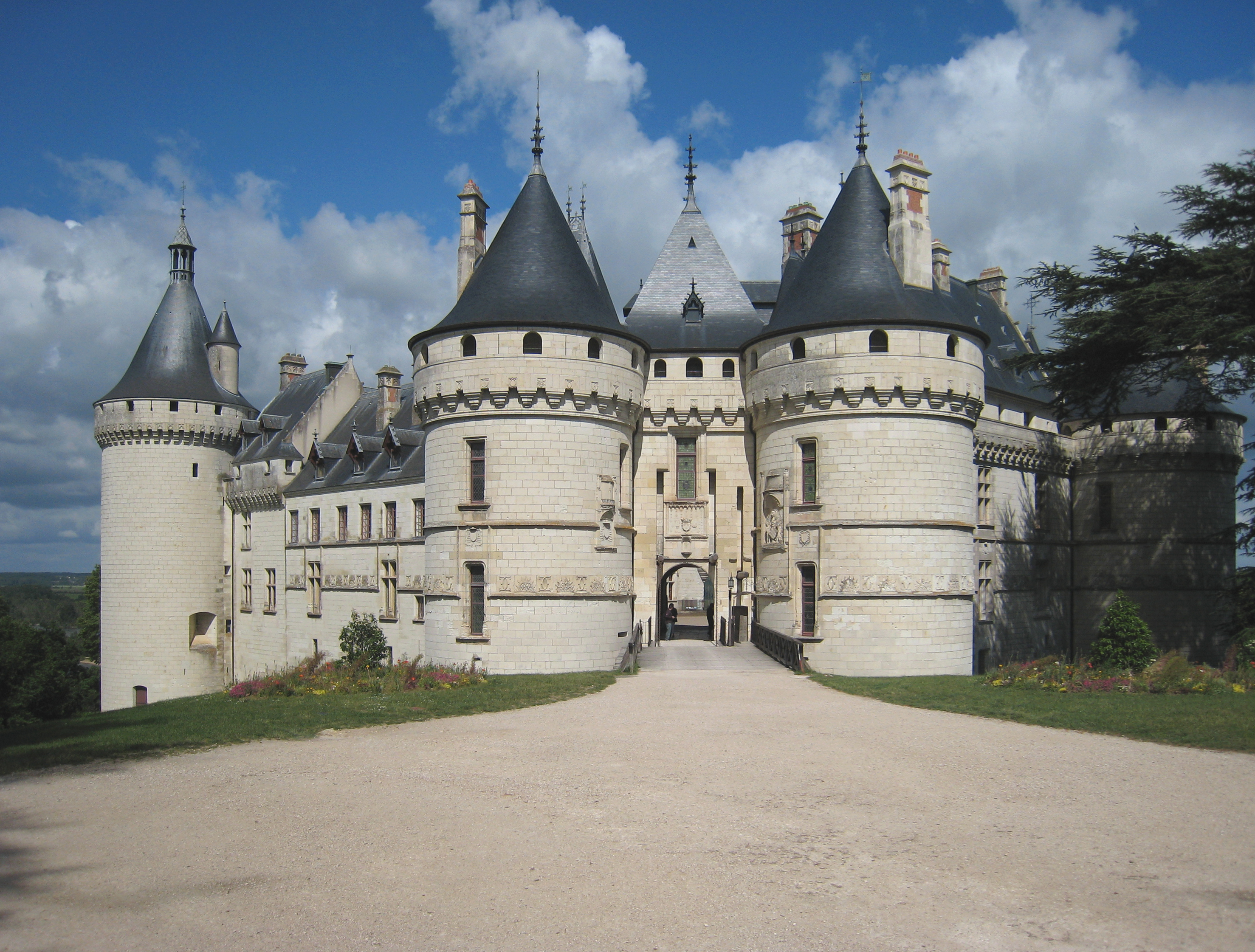 Schloss Chaumont liegt in der Ortschaft Chaumont-sur-Loire im Département Loir-et-Cher/Frankreich.